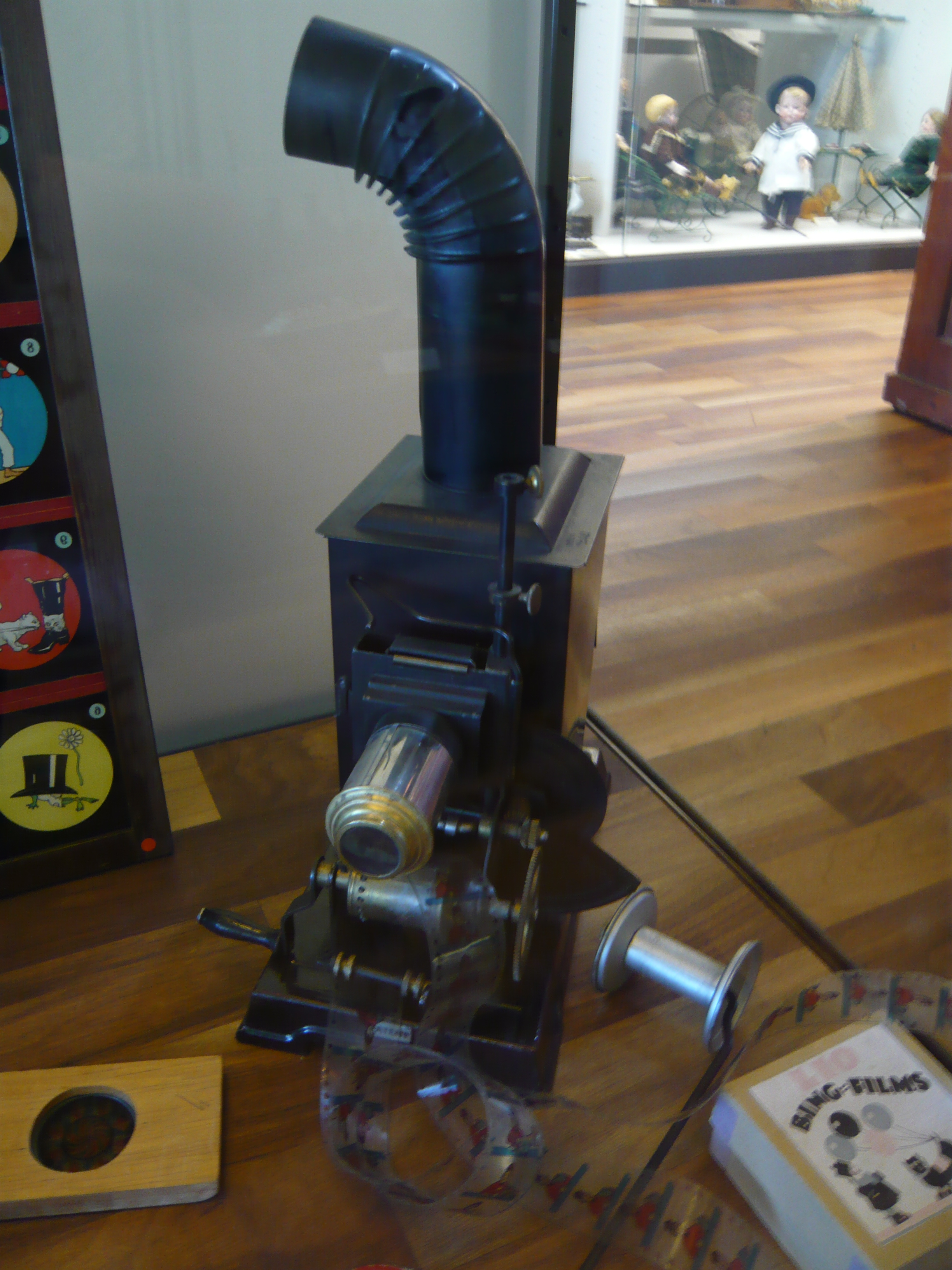 Kombination aus Kinematograph und Laterna Magica von Bing aus dem Jahr 1914 aufgenommen im Zürcher Spielzeugmuseum Native nameZürcher SpielzeugmuseumLocationZürich, SwitzerlandCoordinates47° 22′ 23″ N, 8° 32′ 23″ E Established1956WebsiteZürcher SpielzeugmuseumAuthority control : Q248517